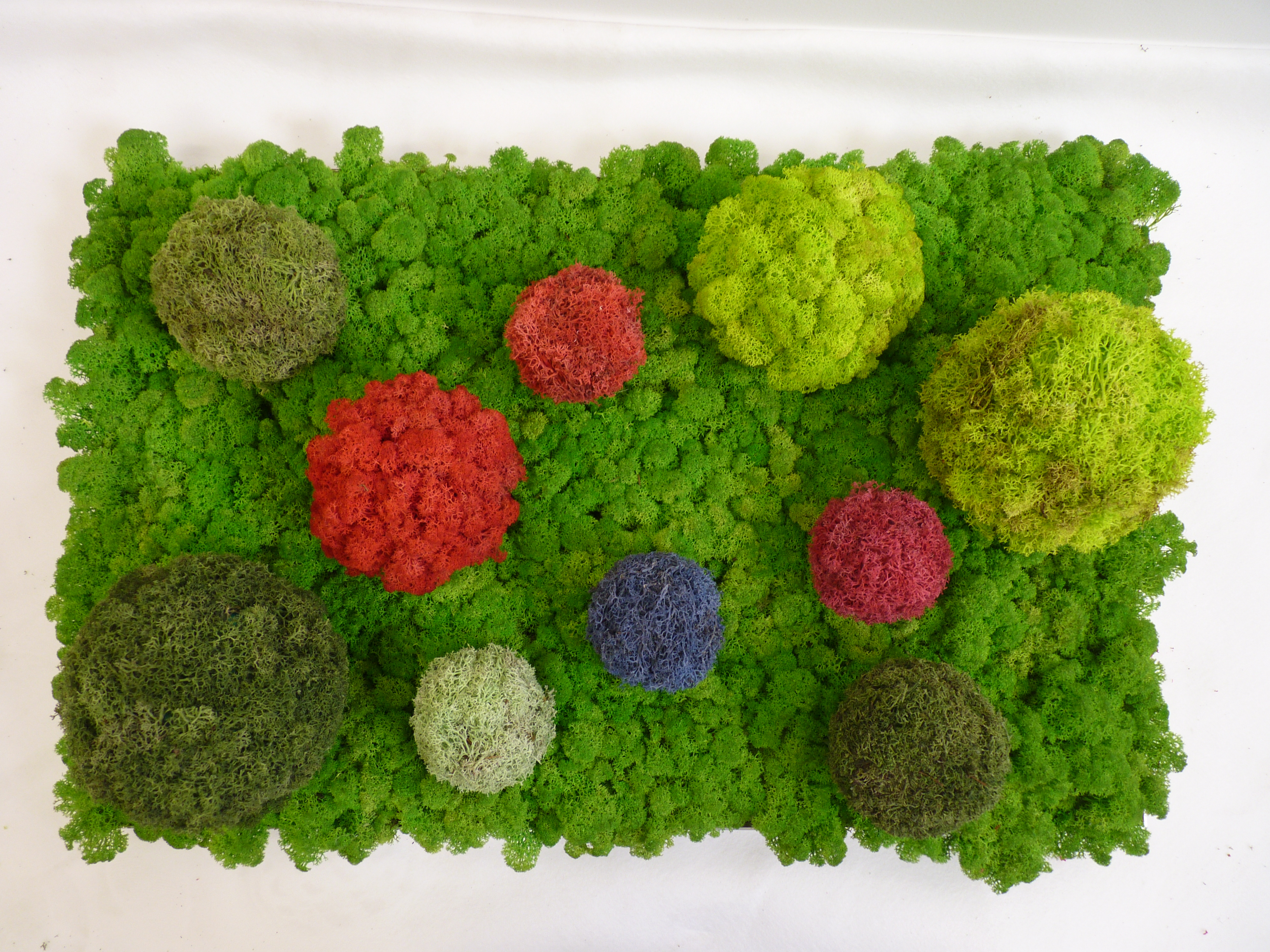 Dekorativni mah se lahko zaradi različne palete barv in neskončno oblik prilagodi tako, da ustreza vsakemu okusu.